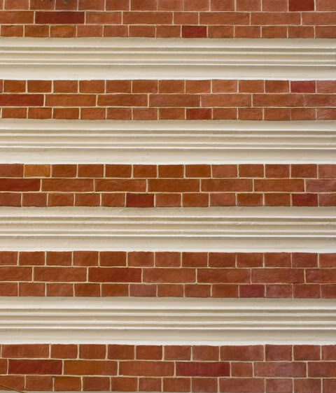 Паласатая муроўка Харальнай (Вялікай) сінагогі